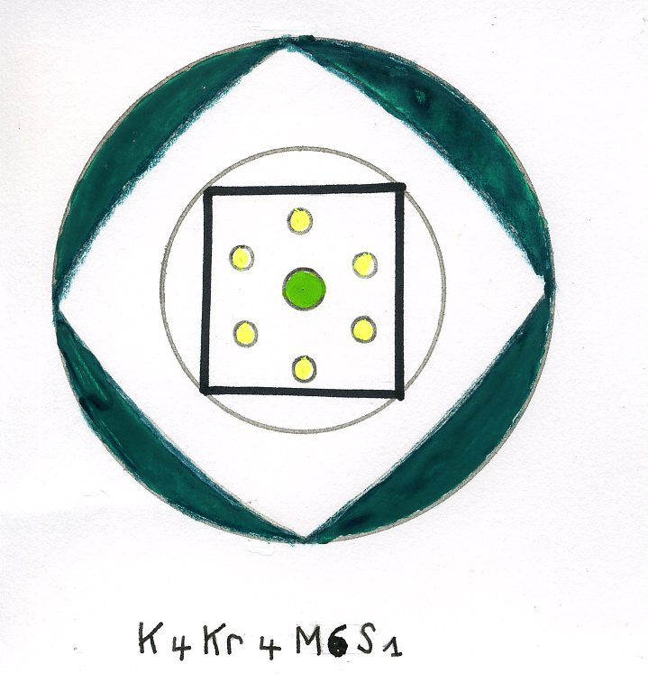 Bloemdiagram Capsella bursa-pastoris (herderstasje)